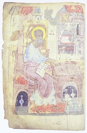 Євангеліст Іван. Мініатюра Лавришівського євангелія.